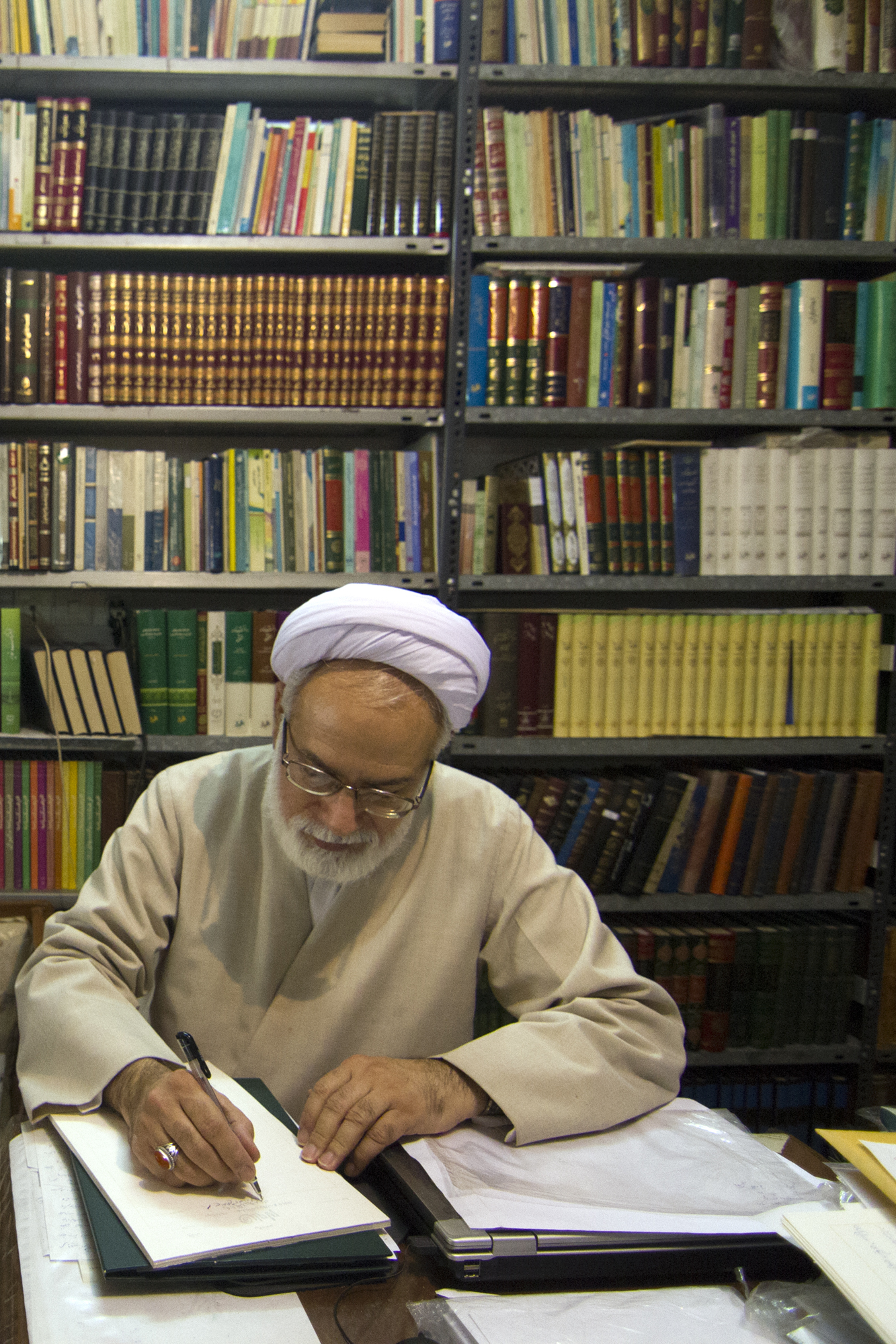 جواد محدثی از نویسندگان مذهبی ایران است.